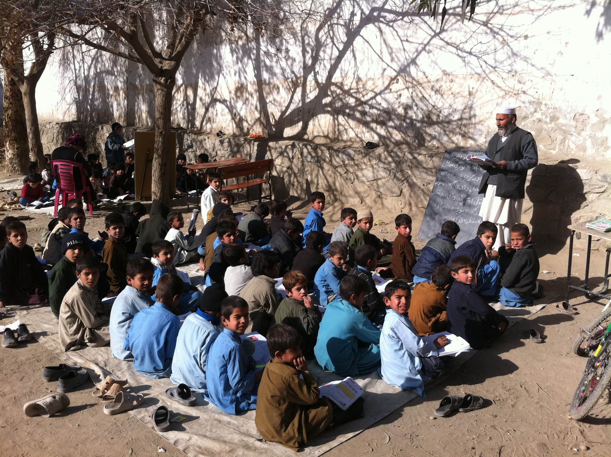 Carpet Classroom